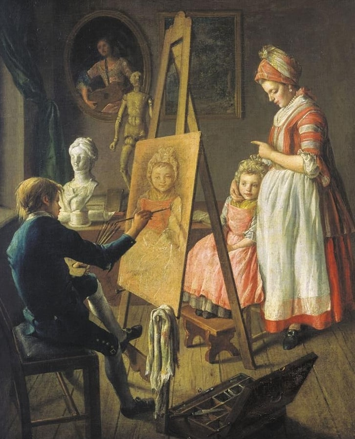 Иван Фирсов. Юный живописец. 2-я пол. 1760-х годов, ГТГ